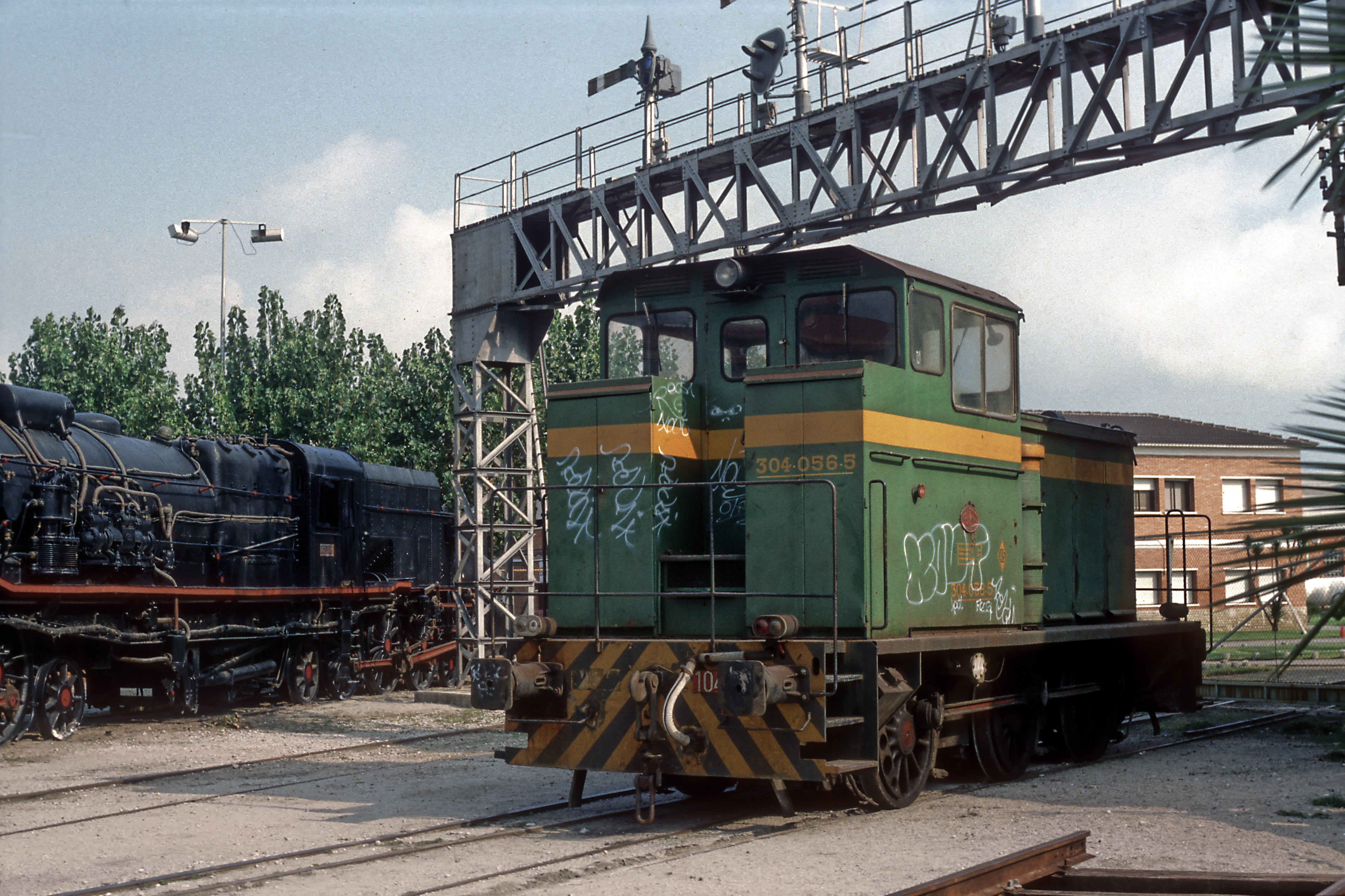 Die Signalbrücke ist mit Licht- und Formsignalen bestückt, die noch recht junge Lok ist nur mit Saugluftbremse ausgerüstet (Grund für ihre Ausmusterung?).